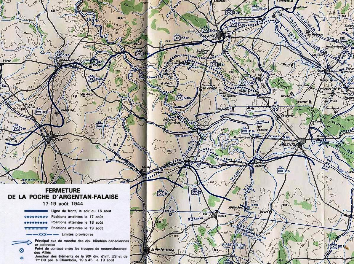 Carte renseignée de la poche de falaise